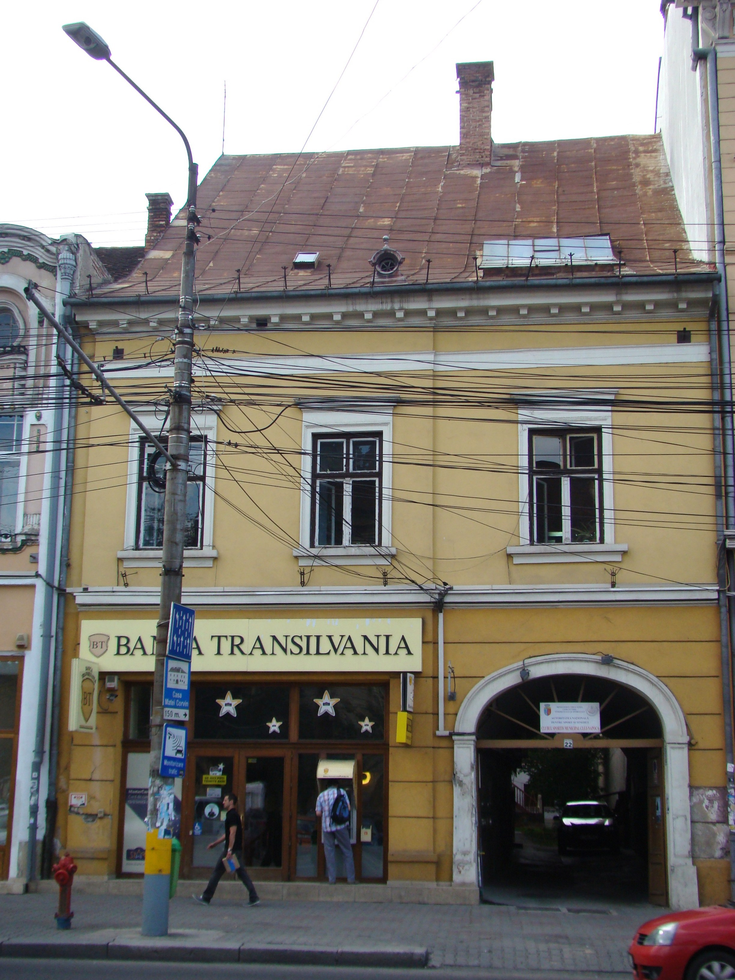 Casă monument istoric, Piața Unirii 22